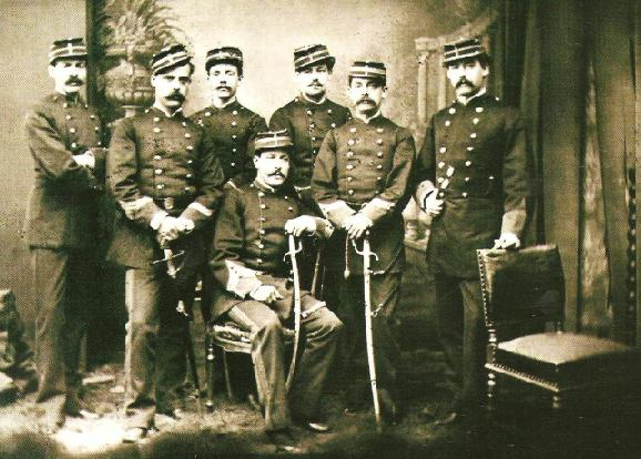 Oficiales del batallón Nro 2 de la Reserva